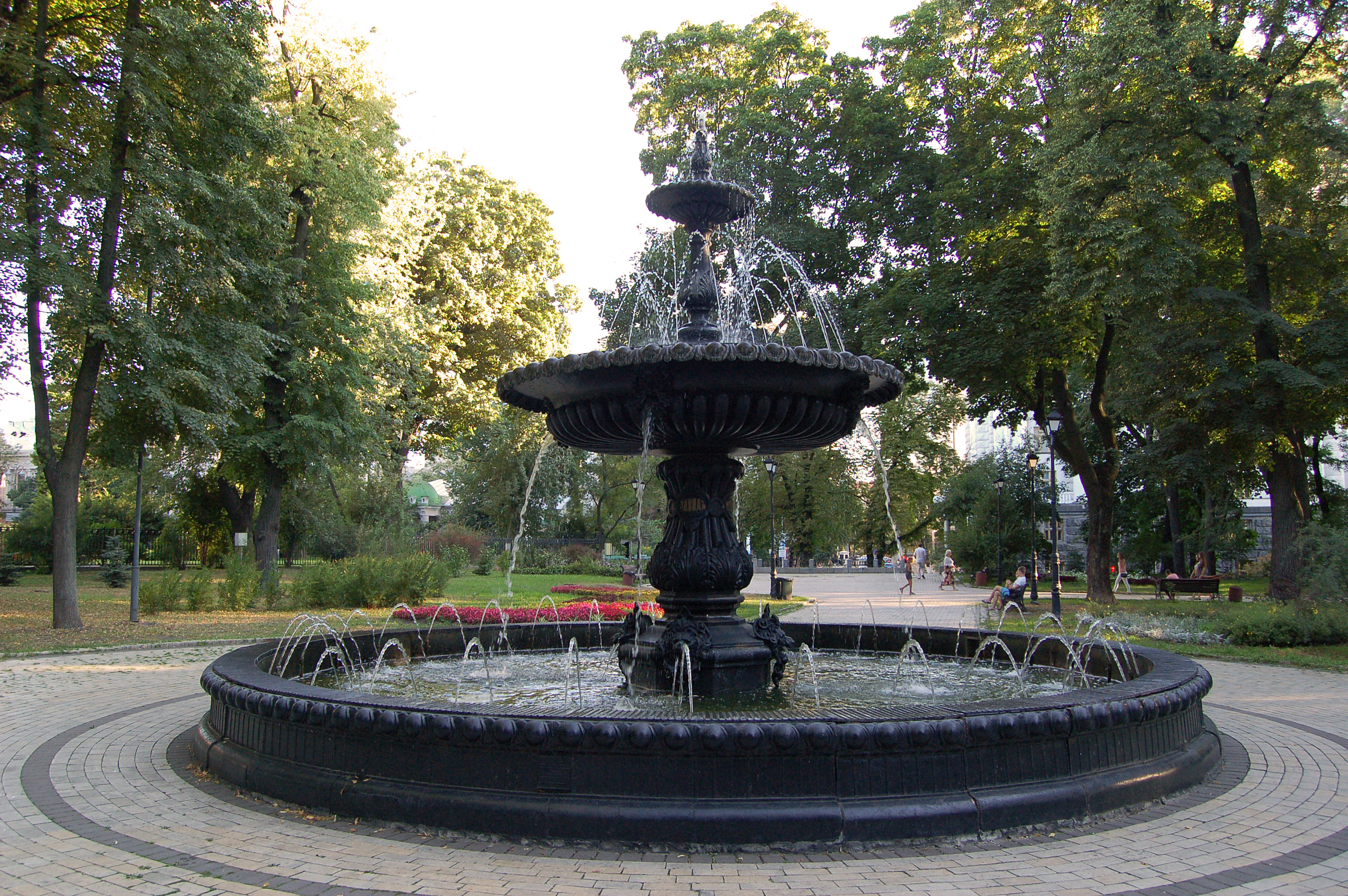 Фонтан у Міському парку у Києві